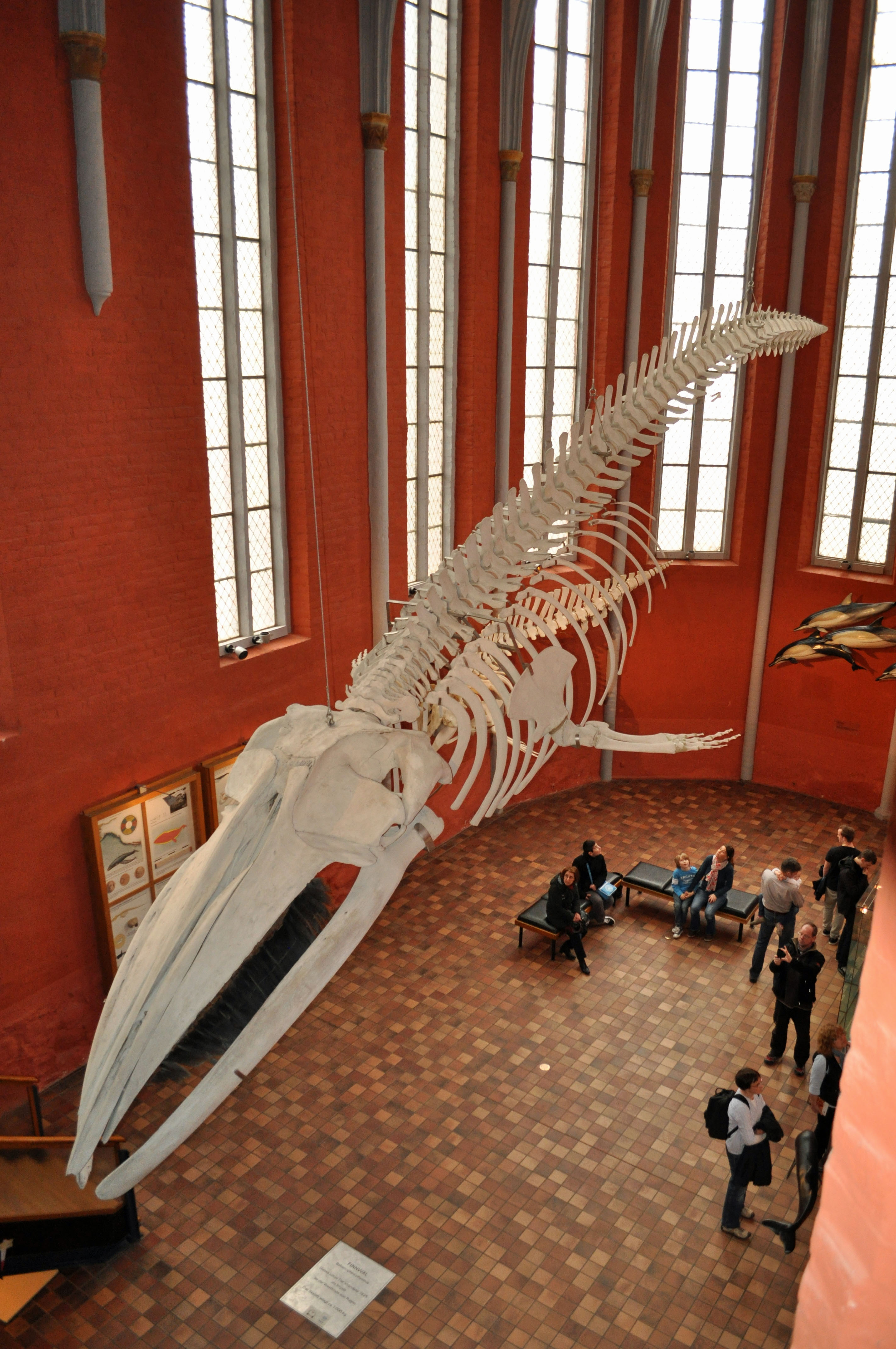 Im Meeresmuseum Stralsund. Das Deutsche Meeresmuseum ist in der ehemaligen Katharinenkirche untergebracht.